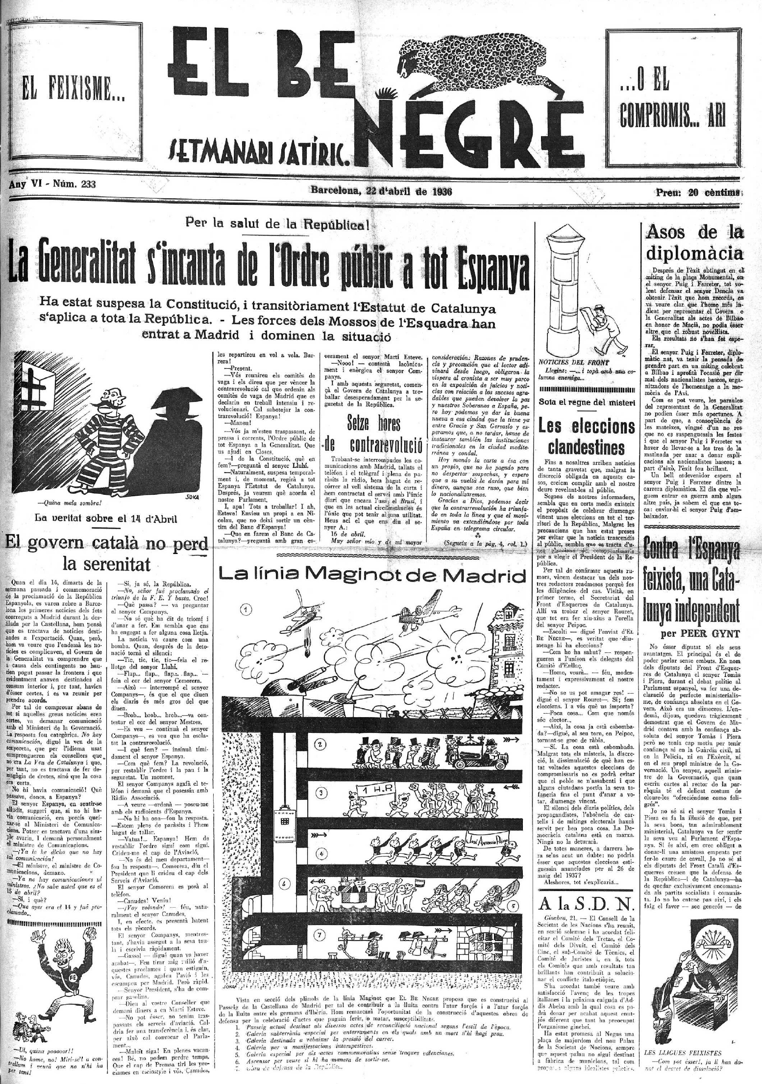 Portada de la revista El Be Negre del 22 d'abril de 1936